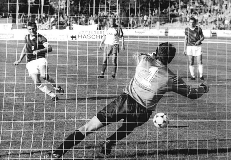 ADN-Ralf Hirschberger-29.9.90-Erfurt: Fußball-Oberliga FC Rot-Weiß Erfurt - FC Energie Cottbus 3:1 In der Blumenstadt war Stürmer-Senior Armin Rumstedt der Held des Tages. Er erzielte alle drei Treffer. Hier überwindet er Gästetorwart Ananiew mit einem Foulstrafstoß zum 2:0 Zwischenstand. Information added by Wikimedia users.Korrekte Namen: Armin Romstedt und Antonio Ananiew